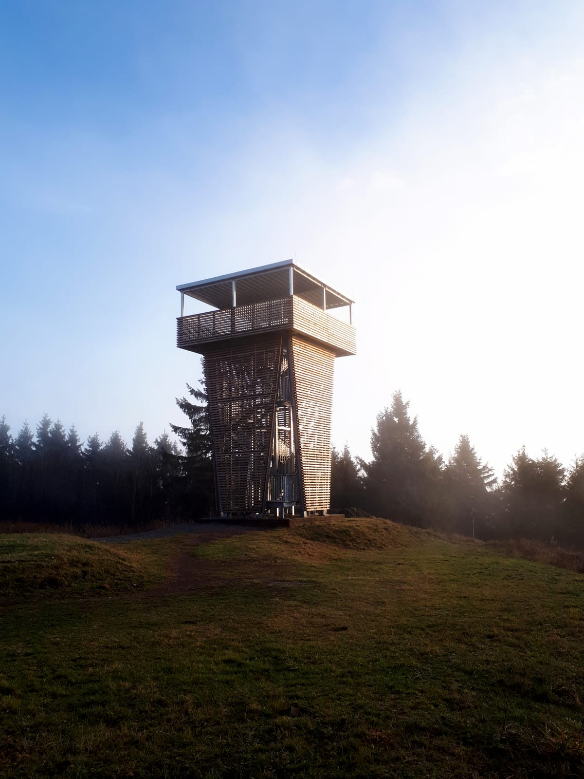 Neuer Aussichtsturm 2019 auf dem Großen Finsterberg, Thüringen